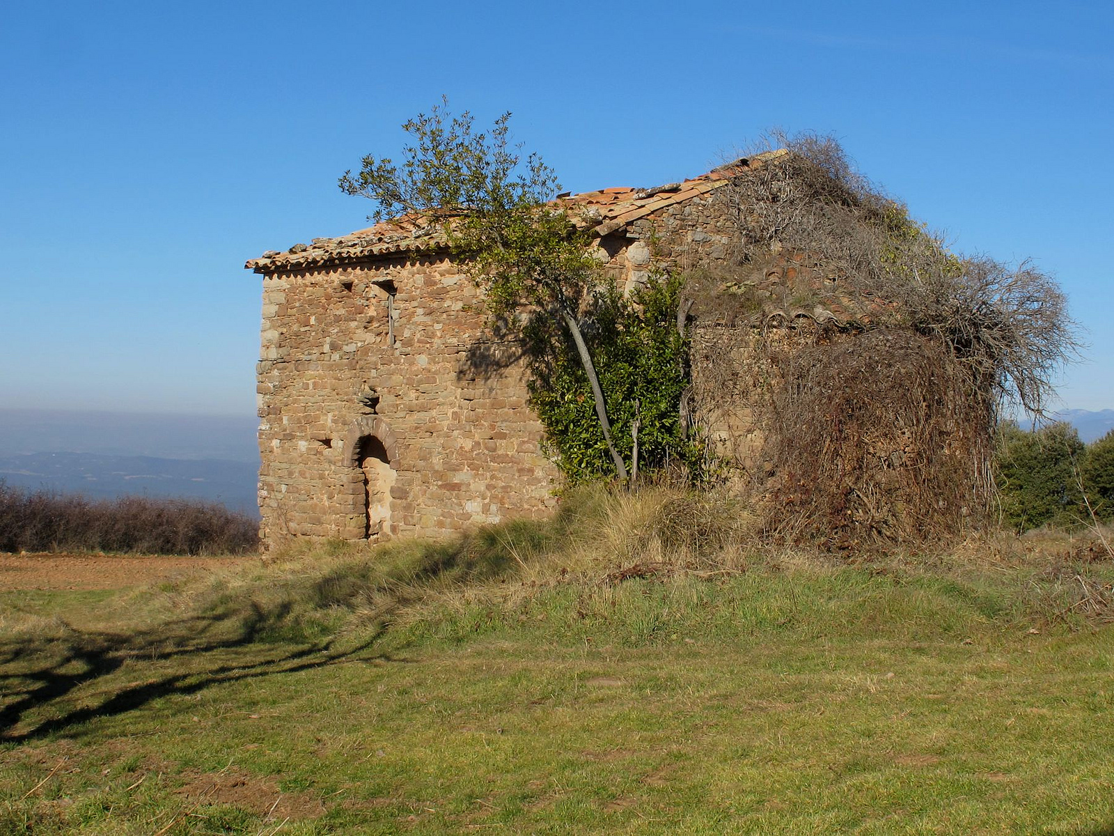 Capella de Sant Miquel d'Oló (Santa Maria d'Oló)